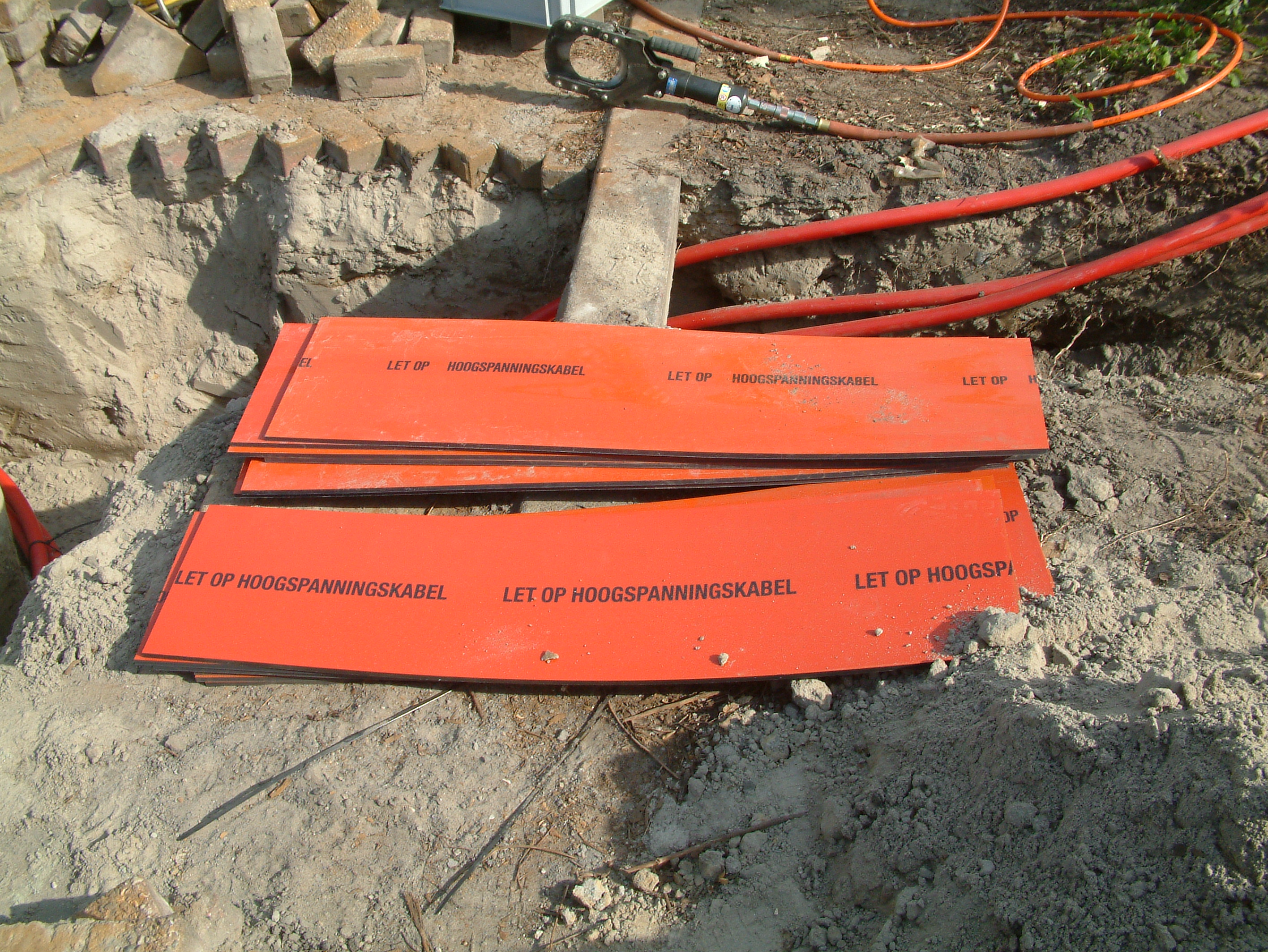 Kabelplankjes hoogspanning.